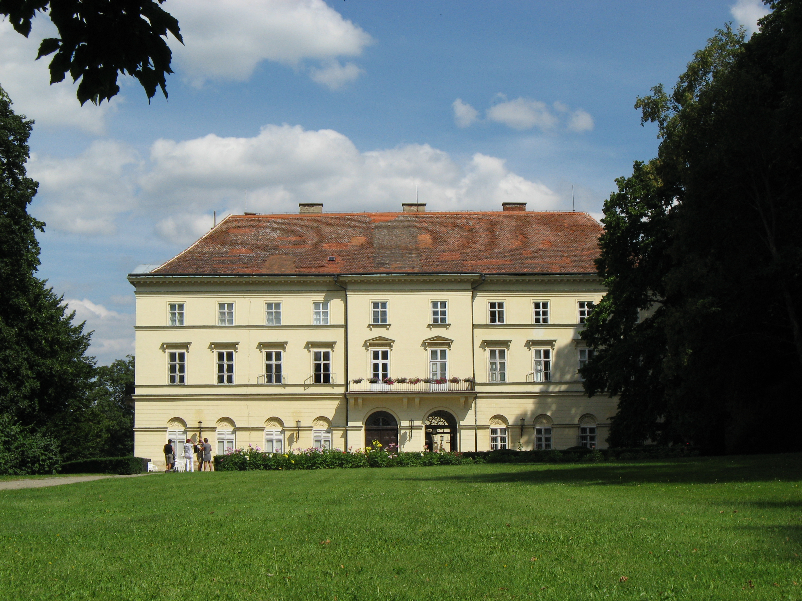 Boskovický zámek ze směru parku